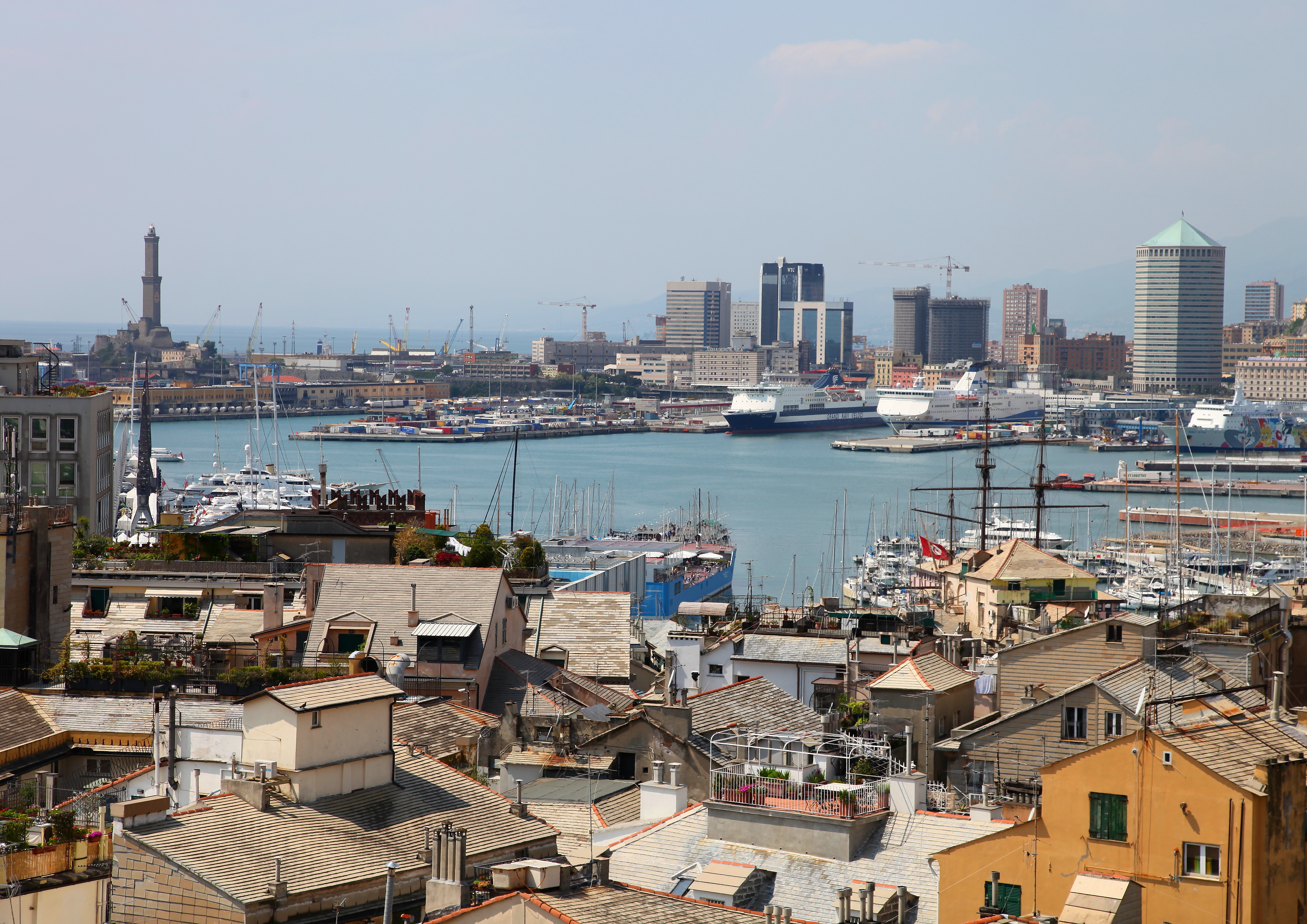 View from Palazzo Rosso; Genoa